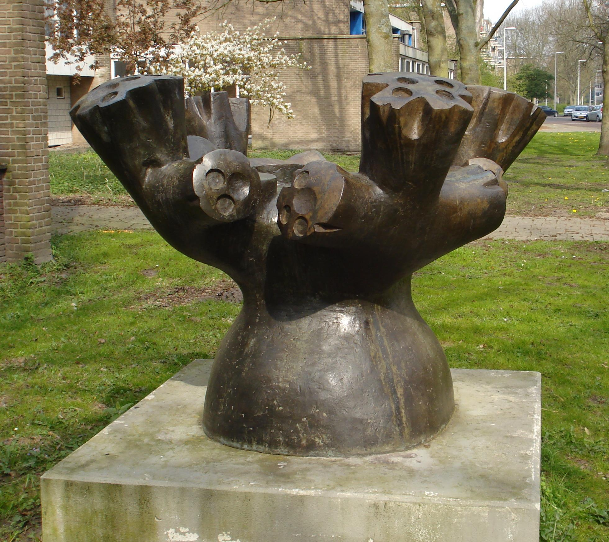 Den Haag, Isabellaland. Kunstwerk "Afgeknotte boom" van Rein Drayer. The Hague/The Netherlands.